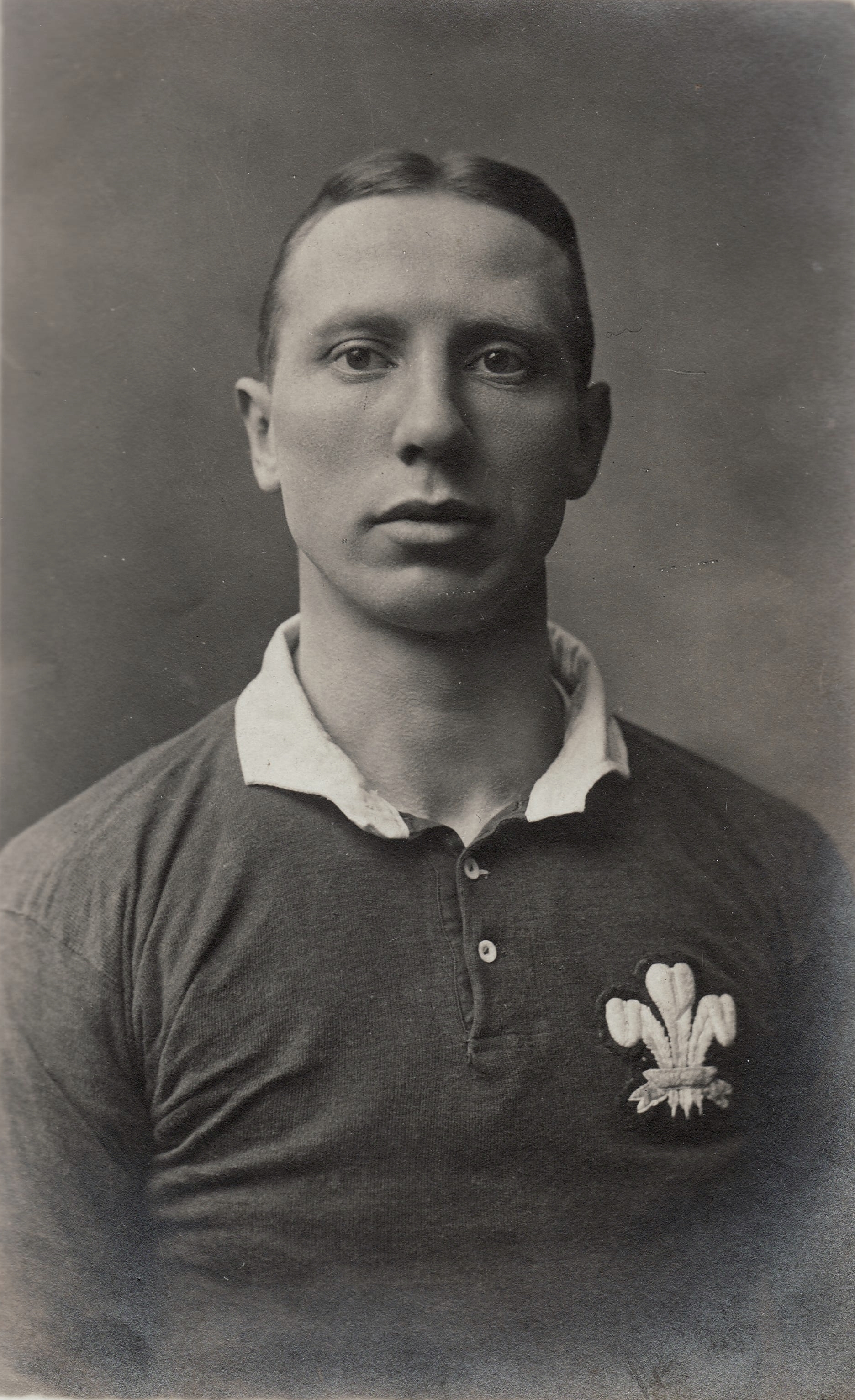 Reggie A. Gibbs, Wales 1906-1911 Reggie Gibbs, né le 7 mai 1882, était un joueur de rugby gallois, évoluant au poste d'ailier pour le Pays de Galles. Reggie Gibbs a disputé son premier test match le 3 février 1906, contre l'Équipe d'Écosse de rugby à XV. Reggie Gibbs a disputé son dernier test match contre l'équipe d'Irlande le 11 mars 1911. Il joue 16 matchs en équipe nationale, il inscrit 18 essais et il réussit 3 transformations. Il a joué en club pour Cardiff RFC. Il inscrit 4 essais contre la France ce qui est toujours un record co-détenu par Reggie Gibbs, Willie Llewellyn, Maurice Richards, Ieuan Evans, Shane Williams et Nigel Walker.